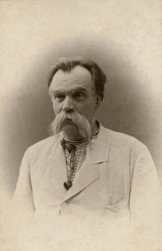 М.Старицький. Поч. 1900-х рр.